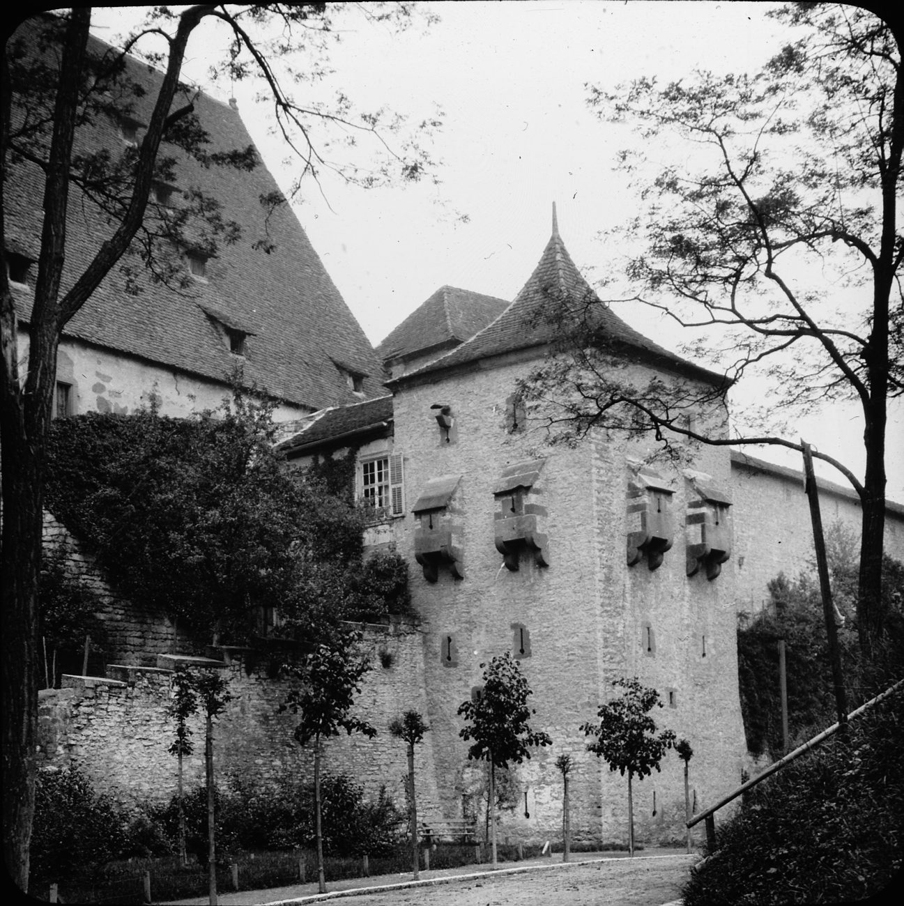 SKC3191 Langenfelder Tor, Schwäbische Hall, 1901. Photo: Sigurd Curman